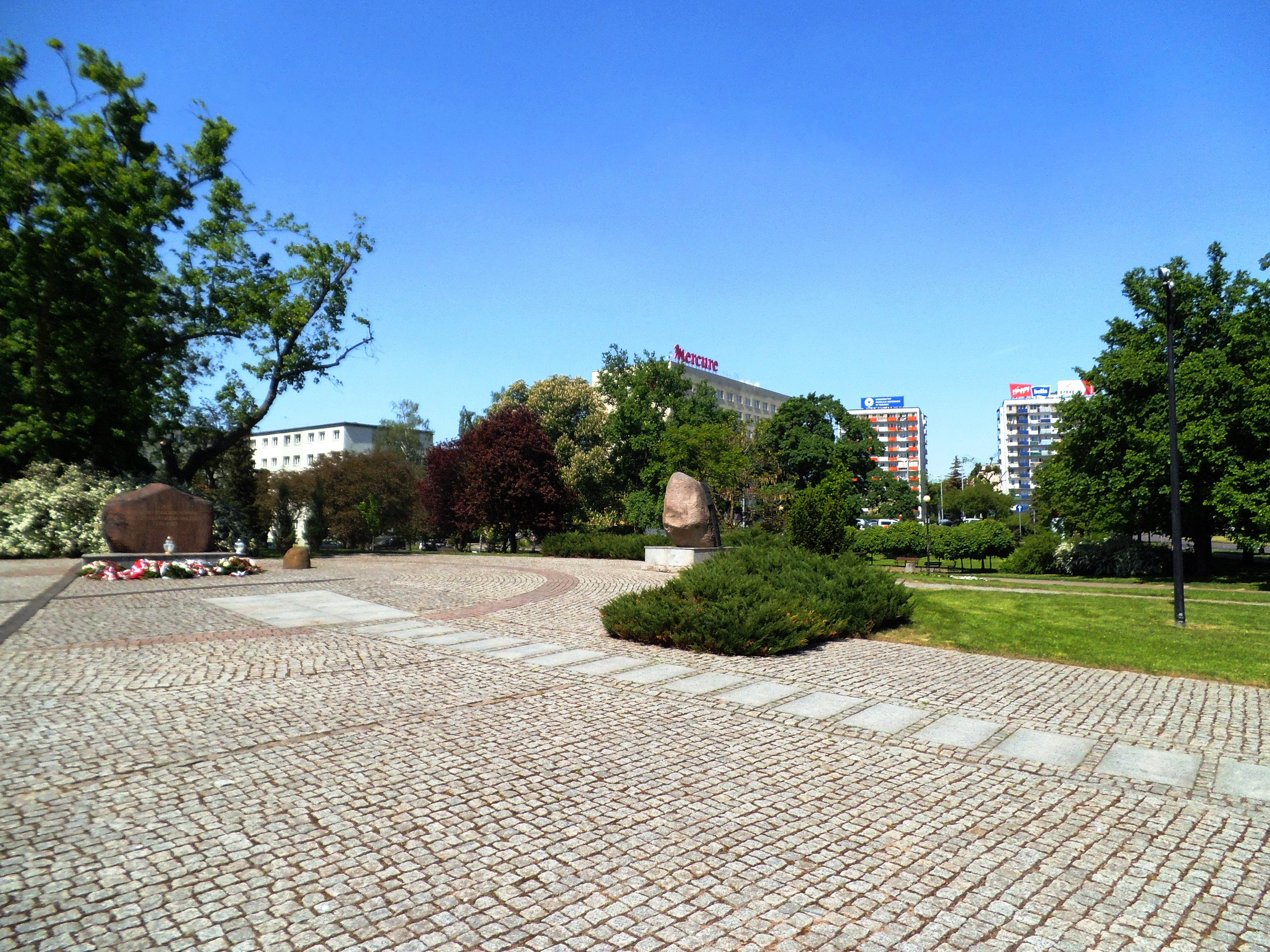 kamień pamiątkowy ku czci ofiar nazizmu w Toruniu1